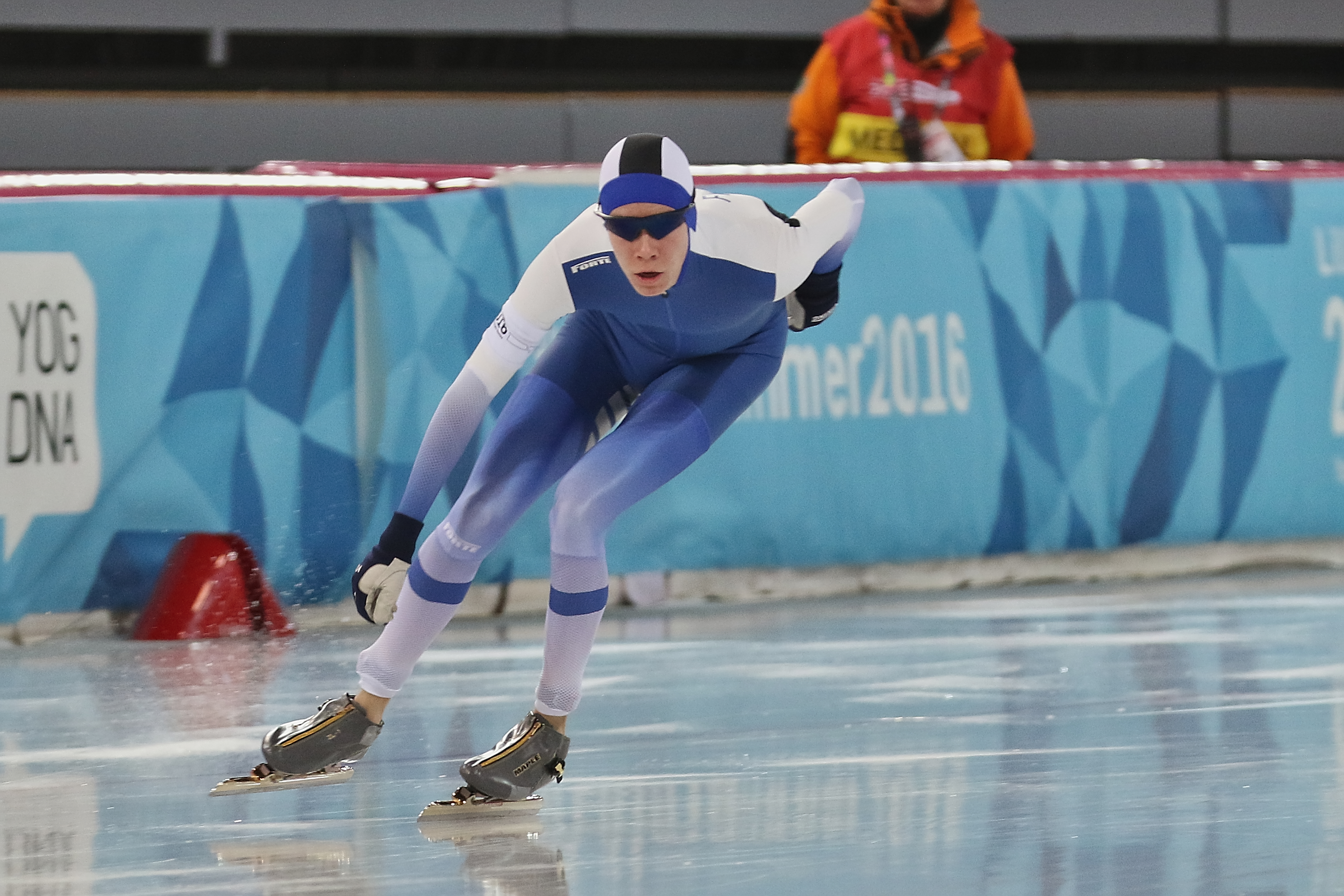 Lillehammer 2016 - Speed skating Men's 500m race 1 - Jaakko Hautamaki